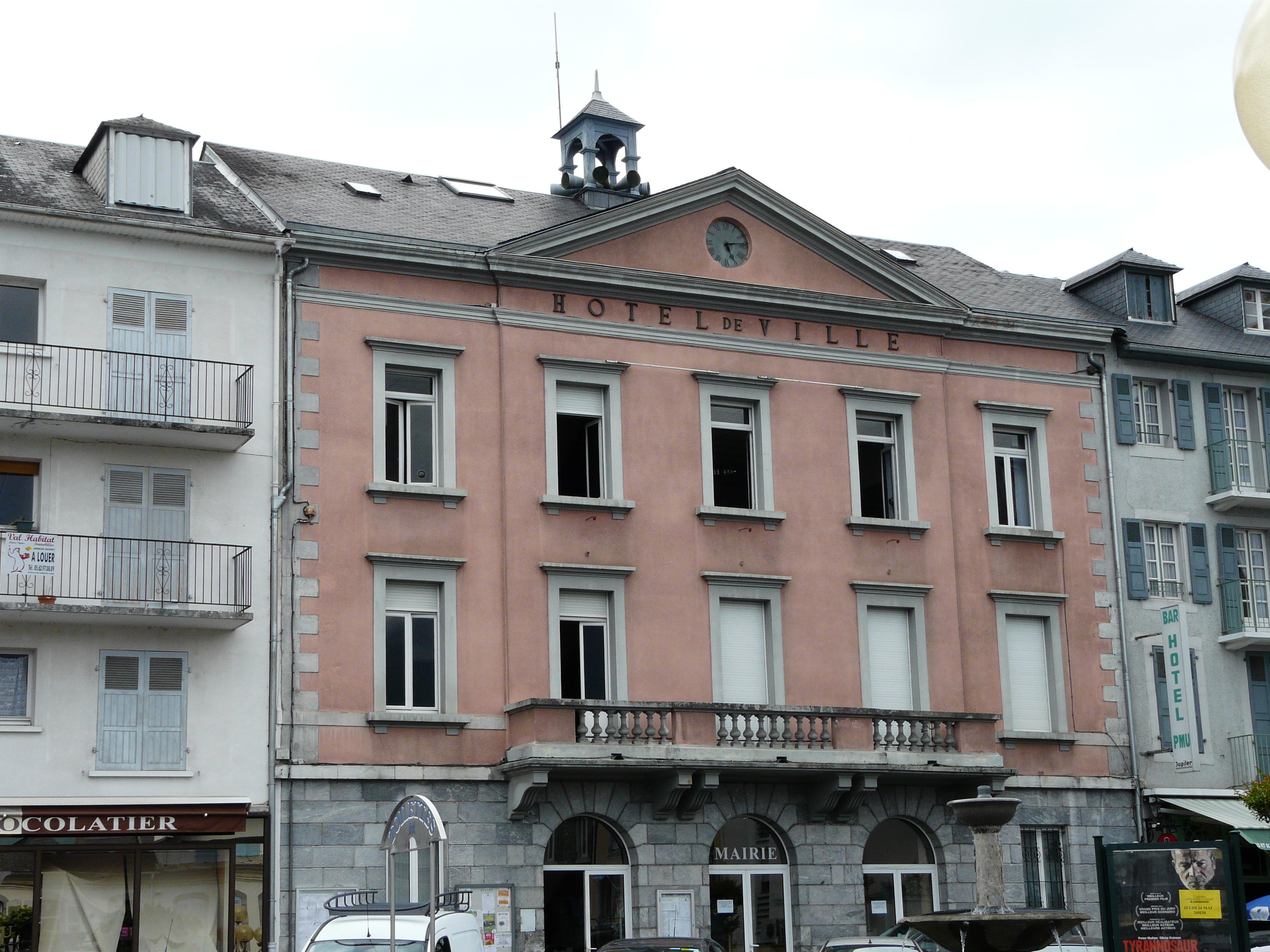 La mairie, Argelès-Gazost,Hautes-Pyrénées, France.